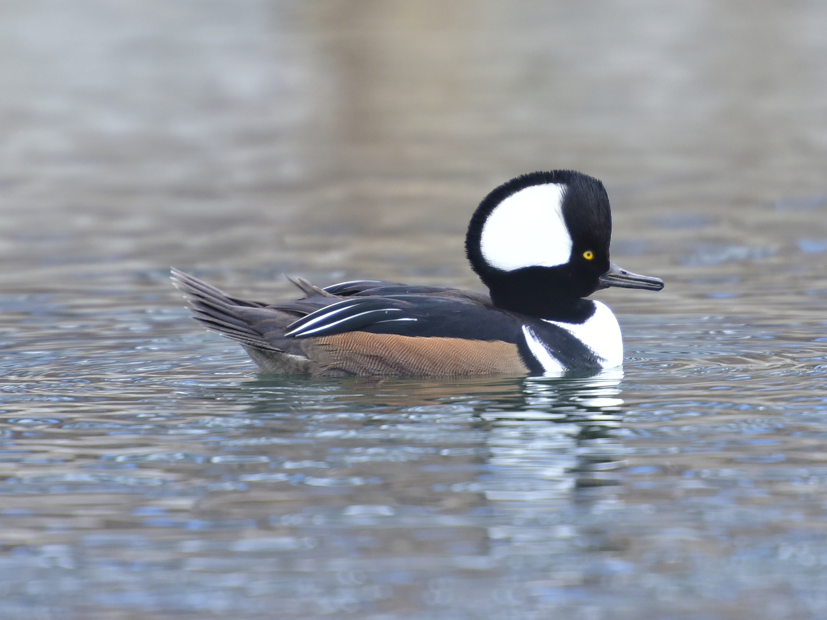 Самець креха жовтоокого (Lophodytes cucullatus) у на ставку парку Гамбер Бей Іст у Торонто, Канада